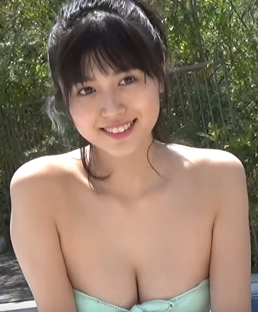 北向珠夕です。